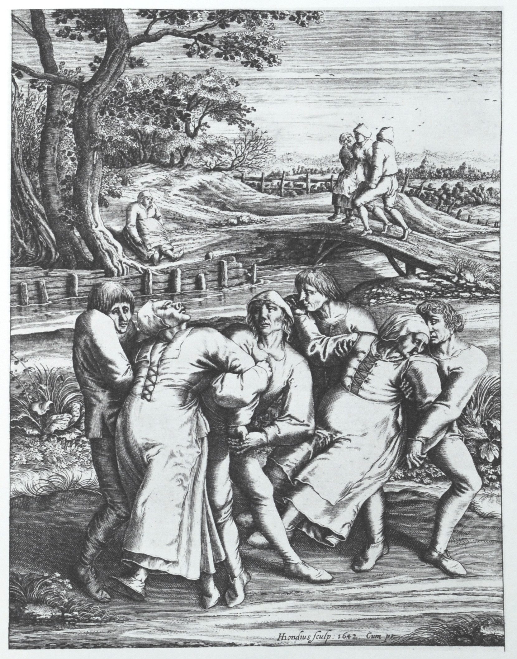 Kupferstich von Hendrik Hondius (1573 - 1649) nach einer Zeichnung Pieter Bruegels des Älteren aus dem Jahre 1564: Die Wallfahrt der Fallsüchtigen nach Meulebeeck (einem Ort in der Nähe von Brüssel). Es wird vermutet, dass Breugel Augenzeuge dieser Ereignisse war. Es dürfte sich hier um eine spätes Auftreten von Tanzwut gehandelt haben.